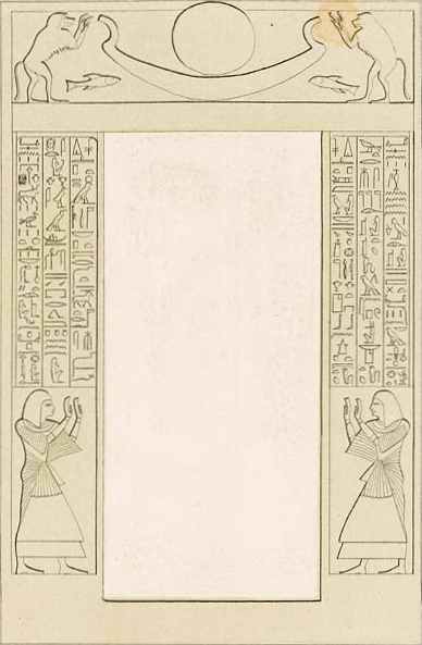 Abzeichnung im Grab des Pennut in Anibe, Ägypten